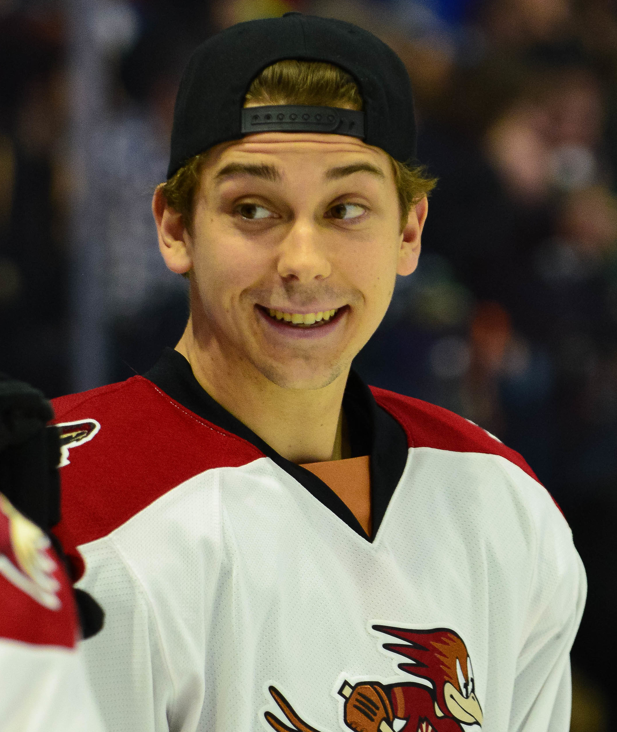 (Bryan Peck/ AHL)